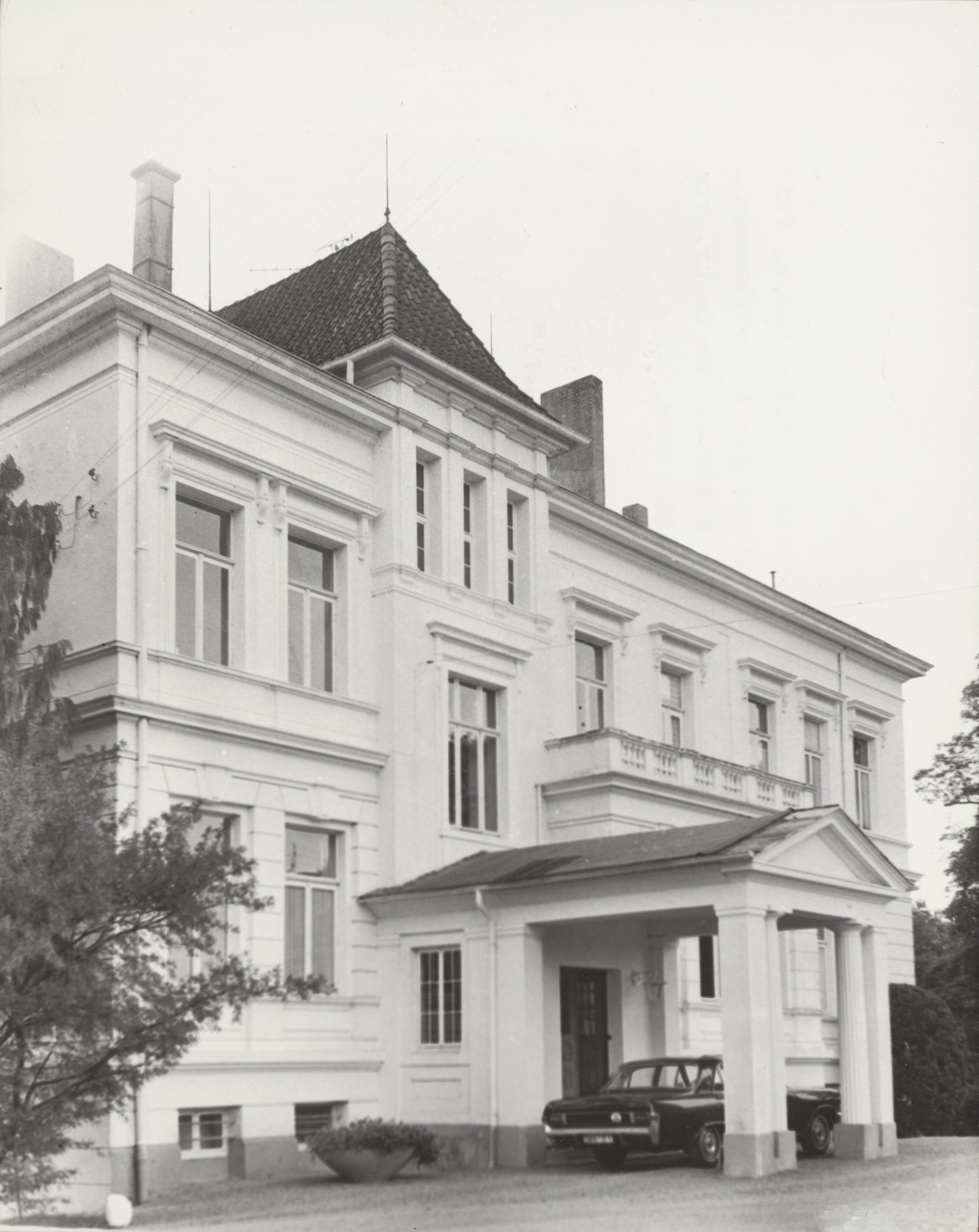 Collectie / Archief : Fotocollectie Elsevier Reportage / Serie : [ onbekend ] Beschrijving : Landgoed Dötzingen te Hitzacker. Geboortegrond van prins Claus Datum : 30 september 1965 Locatie : Duitsland, Hitzacker Trefwoorden : landhuizen Fotograaf : Fotograaf Onbekend / Anefo Auteursrechthebbende : Nationaal Archief Materiaalsoort : Foto (zwart/wit) Nummer archiefinventaris : bekijk toegang 2.24.05.02 Bestanddeelnummer : 017-1177